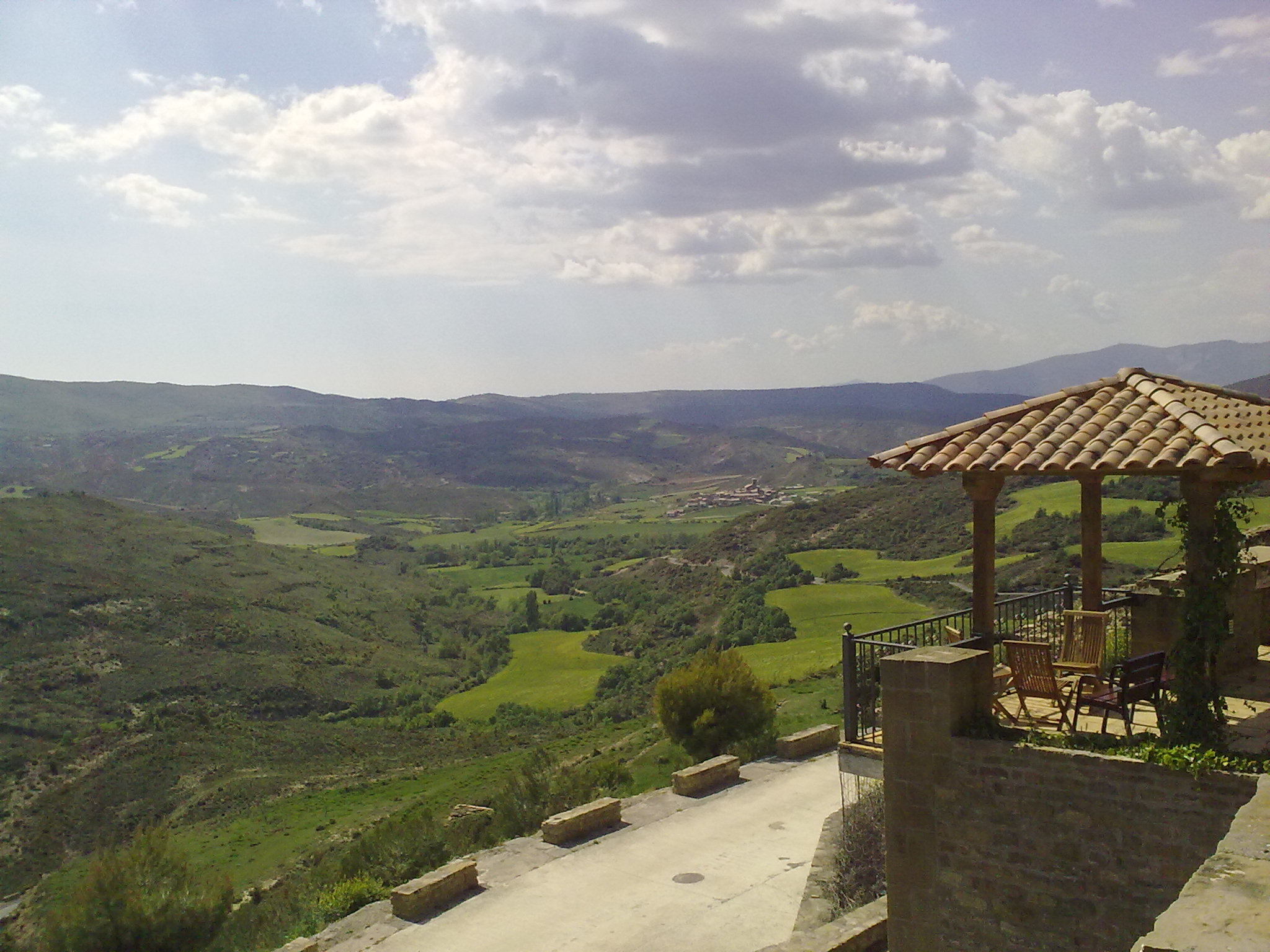 Pintano le 23 mai 2010.